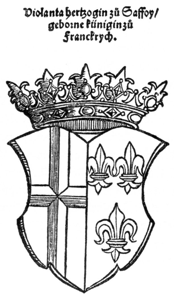 Wappen der Herzogin Jolande von Savoyen aus der Stumpf'schen Chronik